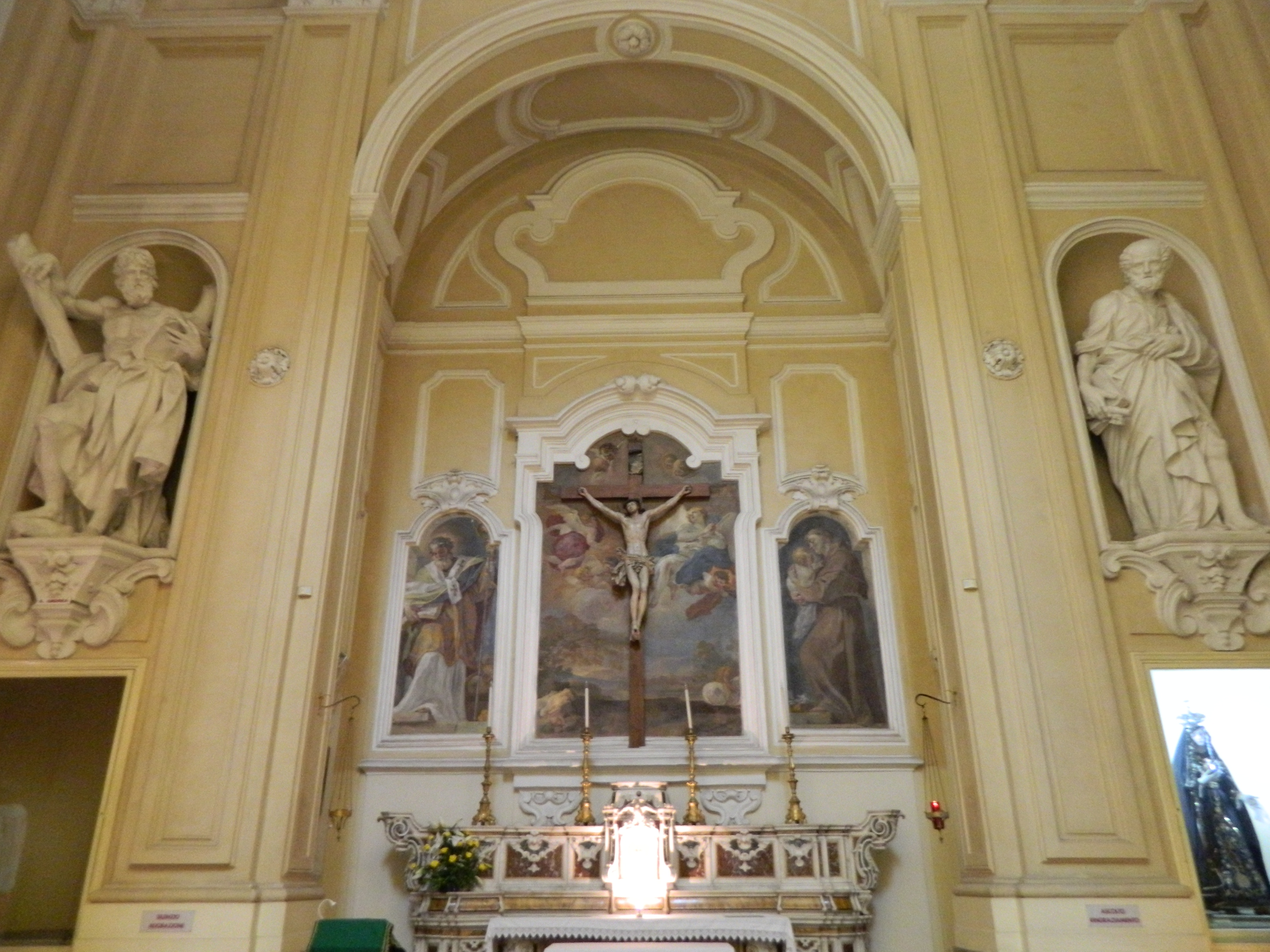 Chiesa di San Giorgio Maggiore (Napoli) - Affreschi giovanili di Francesco Solimena